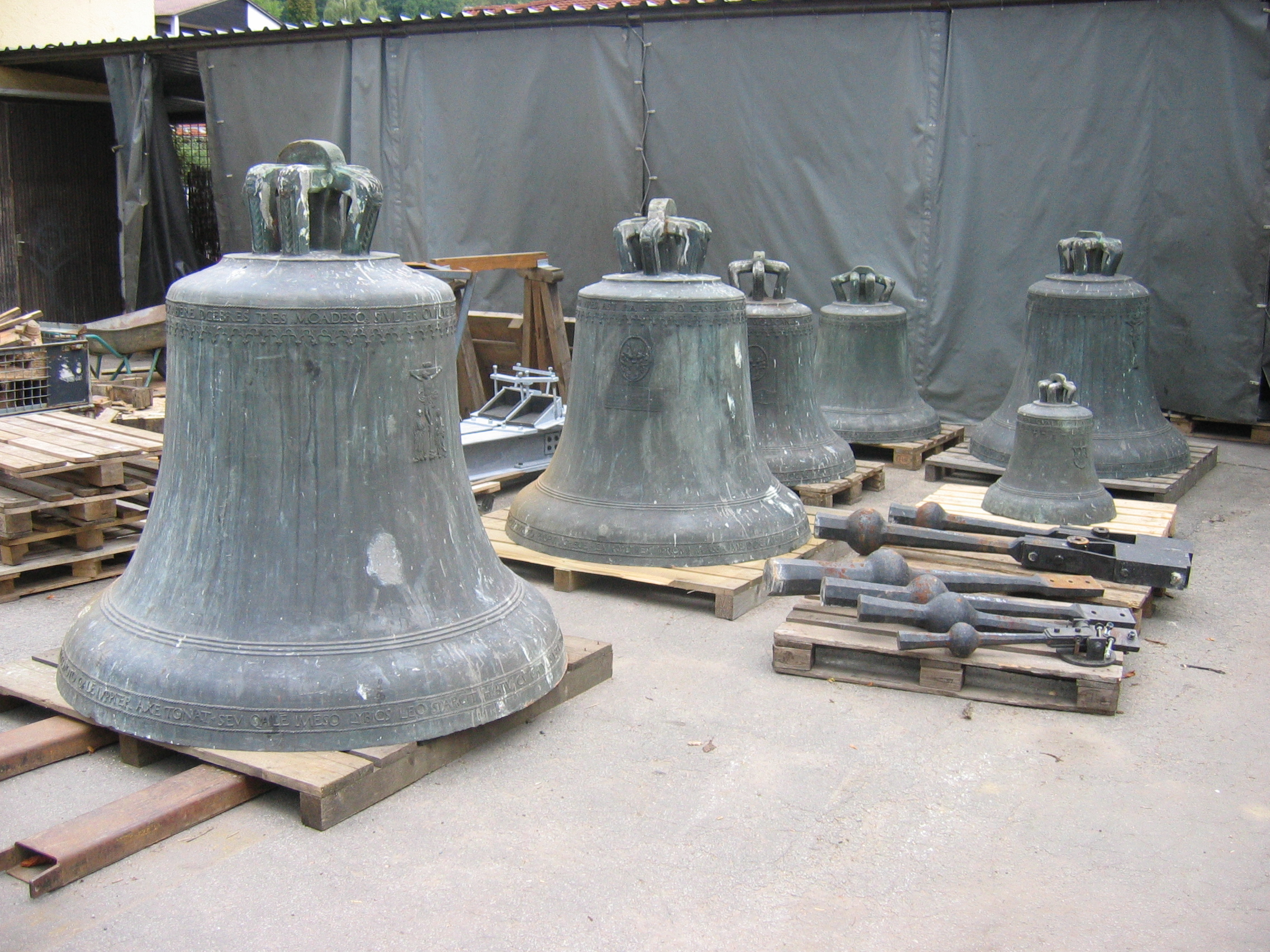 Ein Teil des Renaissancesgeläutes des Freisinger Domes stand im Hof der Glockengießerei Perner zu Passau: (v.l.) Sigismund- (c′), Marien- (es′), Lantpert- (g′), Nonnosus- (g’), Friedens- (e″) und Kreuzglocke (e′).